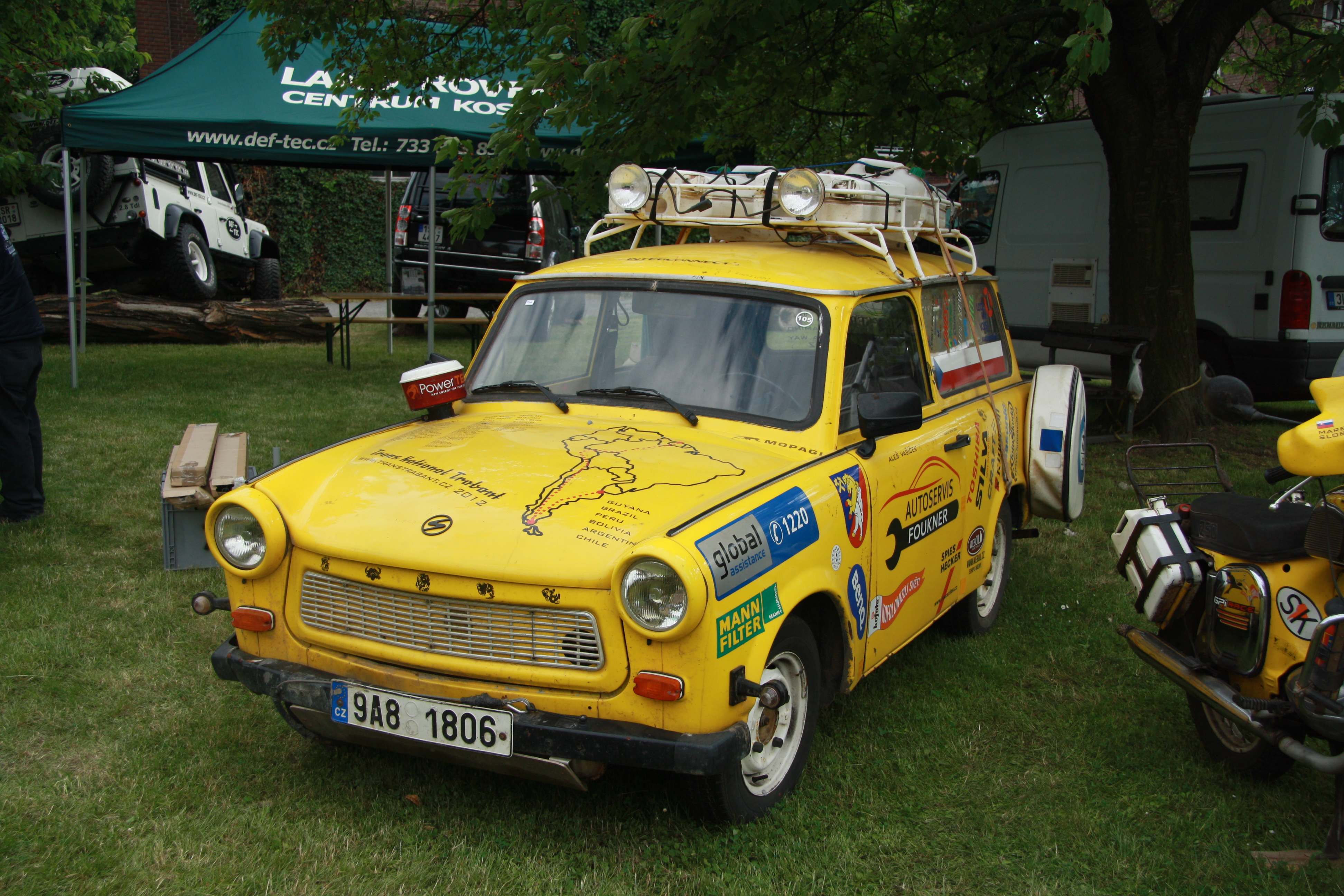 Transtrabant Egu na akci Legendy 2014